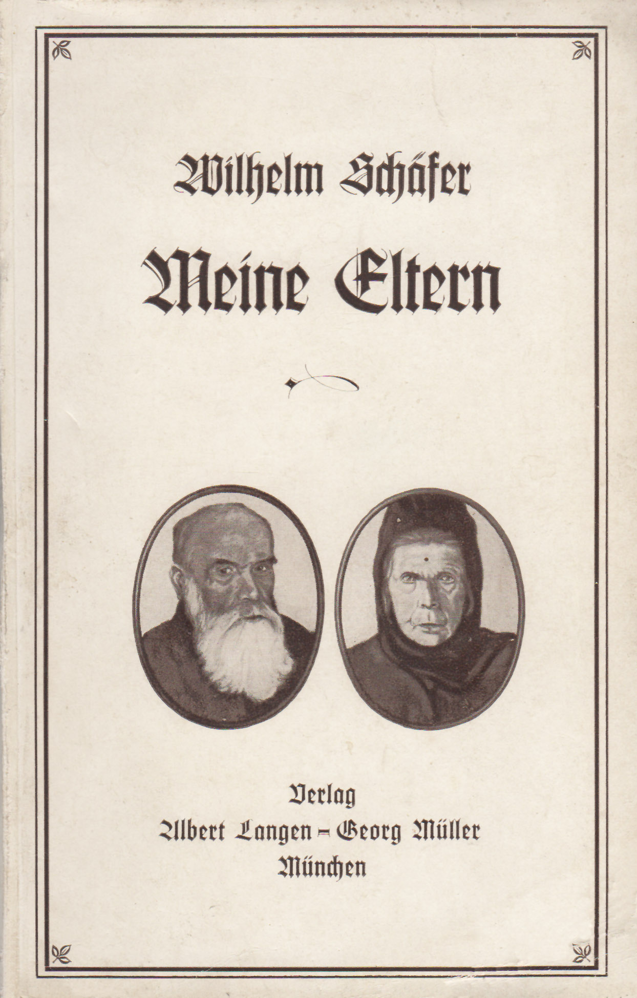 Meine Eltern von Wilhelm Schäfer, Verlag Albert Langen Georg Müller München (Auflage 1944), das Buch enthält 140 Textseiten (gedruckt in Fraktur) und 2 Seiten mit den Abbildungen seiner Eltern.